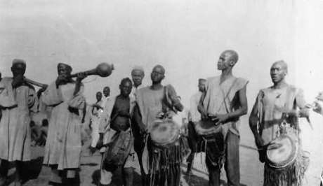 Fort Archambault, sur le Chari, décembre 1924